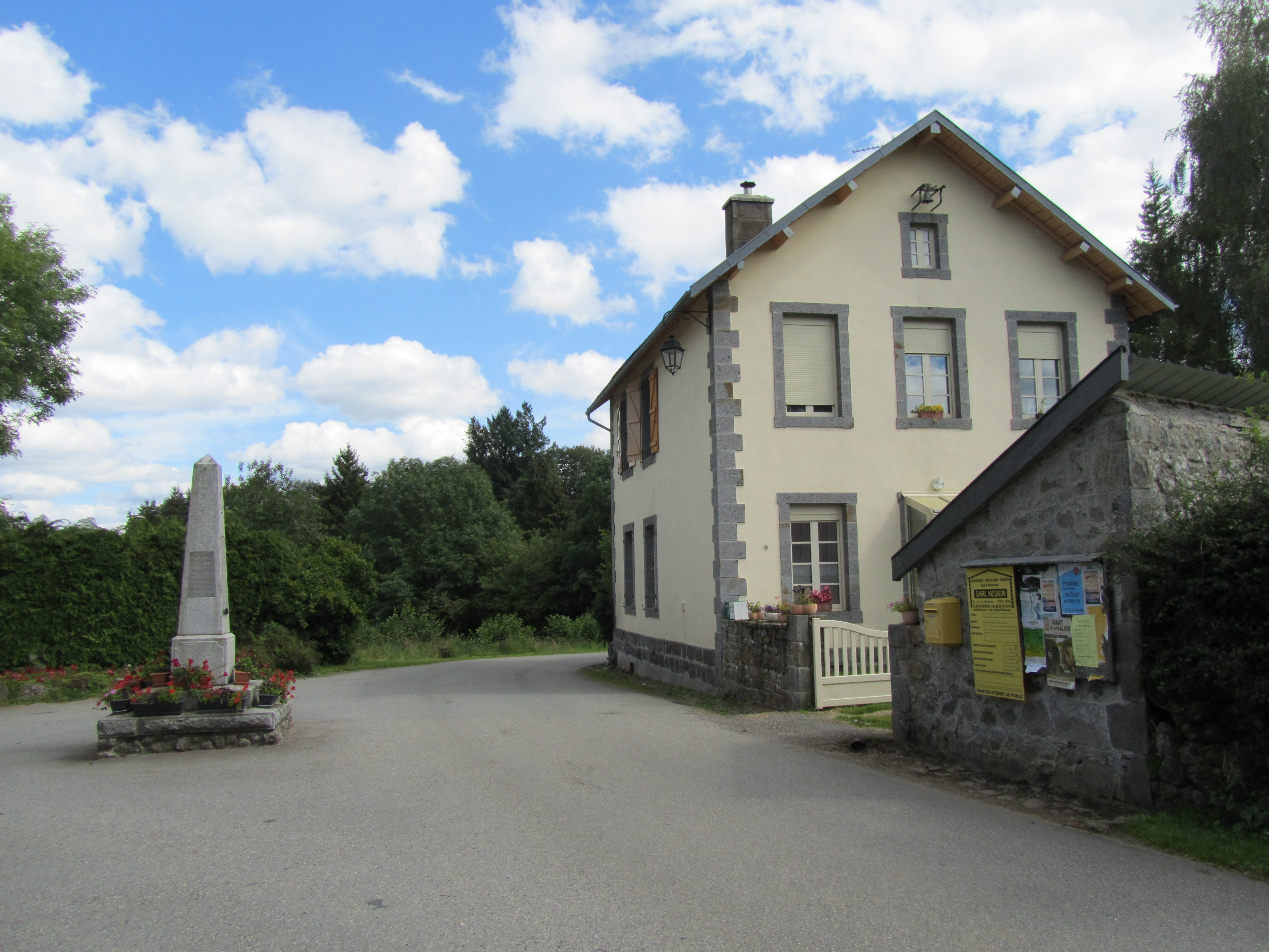 La mairie et le monument aux morts de Lamazière-Haute en août 2014